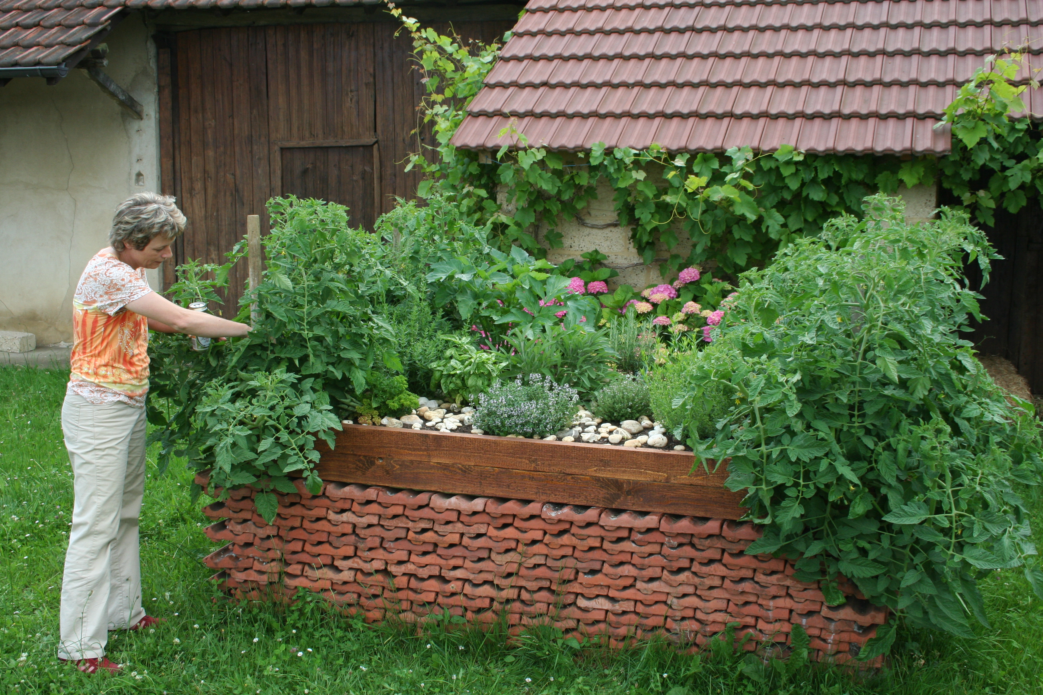 Hochbeet mit Unterbau aus Ziegeln, die zusätzlich Wärme speichern